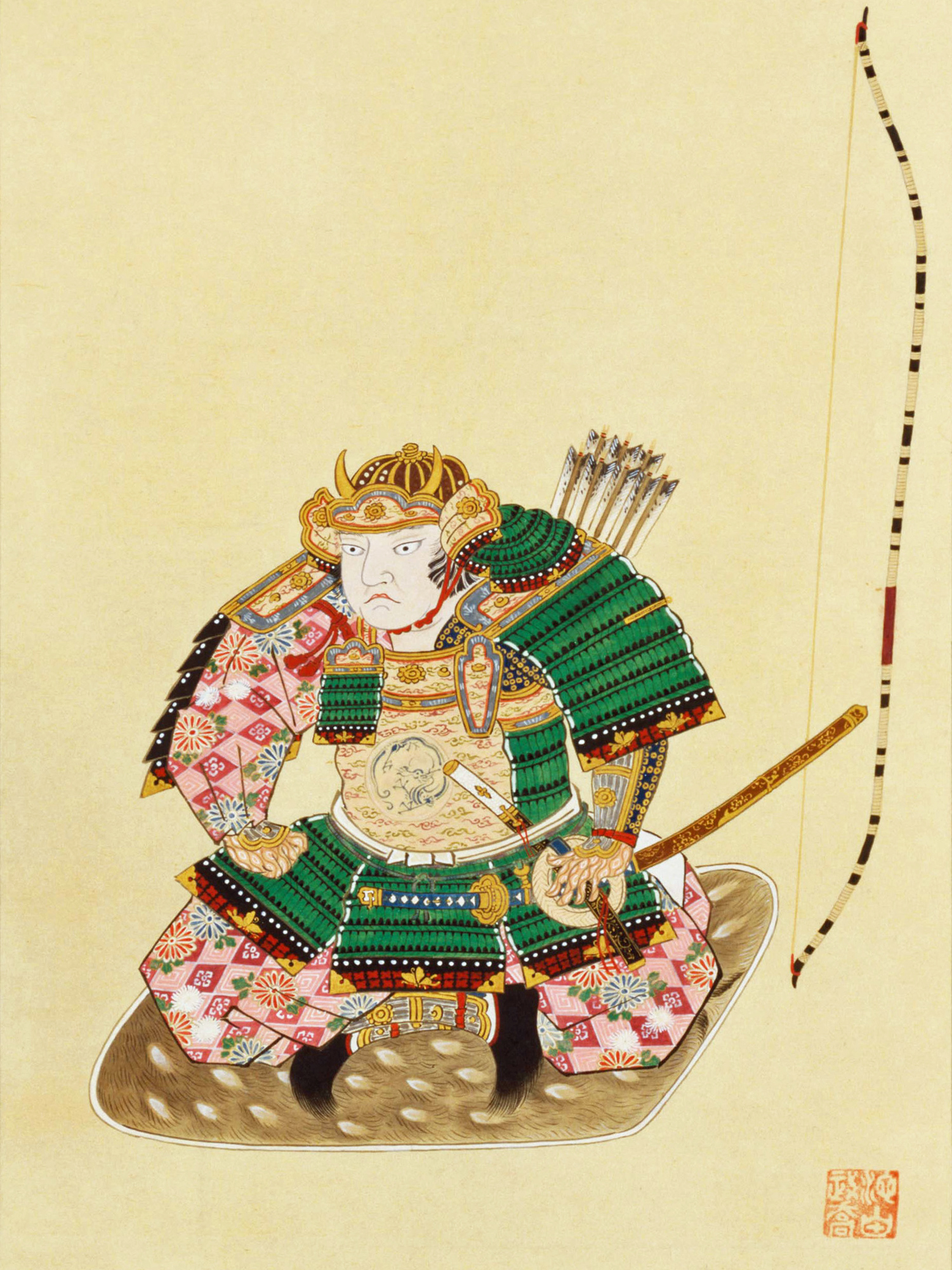 池田元助像の一部。模写。（カット部分に）池田政喬賛。 原本は岐阜県揖斐郡本郷村龍徳寺所蔵。